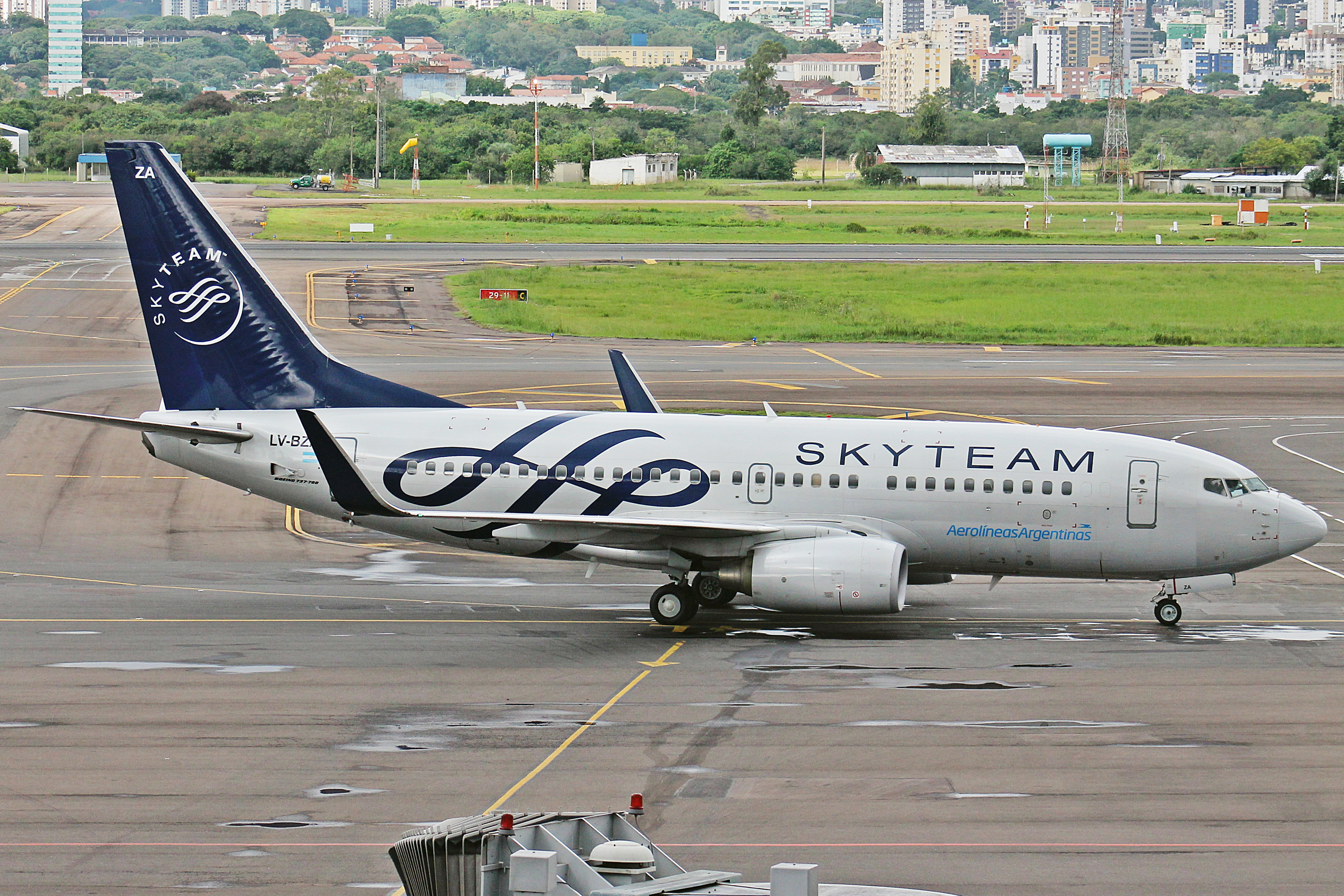 24/04/2015 SBPA Porto Alegre-RS